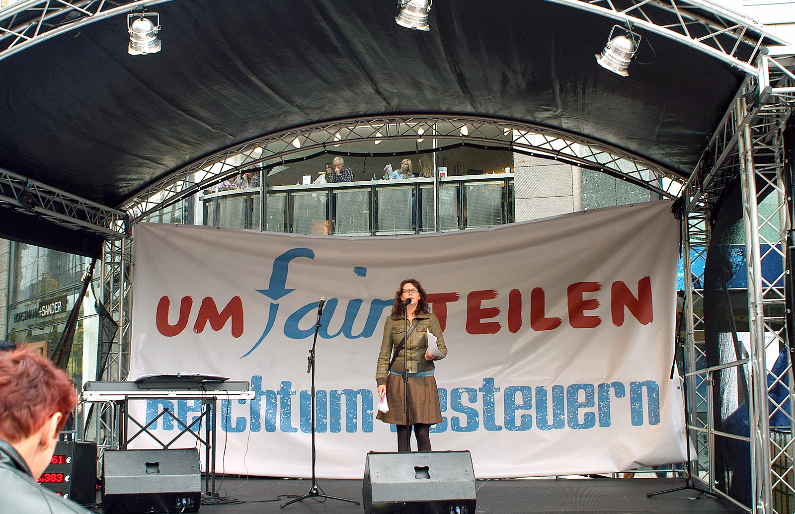 Die Bühne am Schillerdenkmal in der Georgstraße von Hannover am bundesweiten Aktionstags "UmFAIRteilen - Reichtum besteuern", hier mit der Sprecherin Jeannine Geißler ver.di Bezirk Hannover, Leine/Weser ...